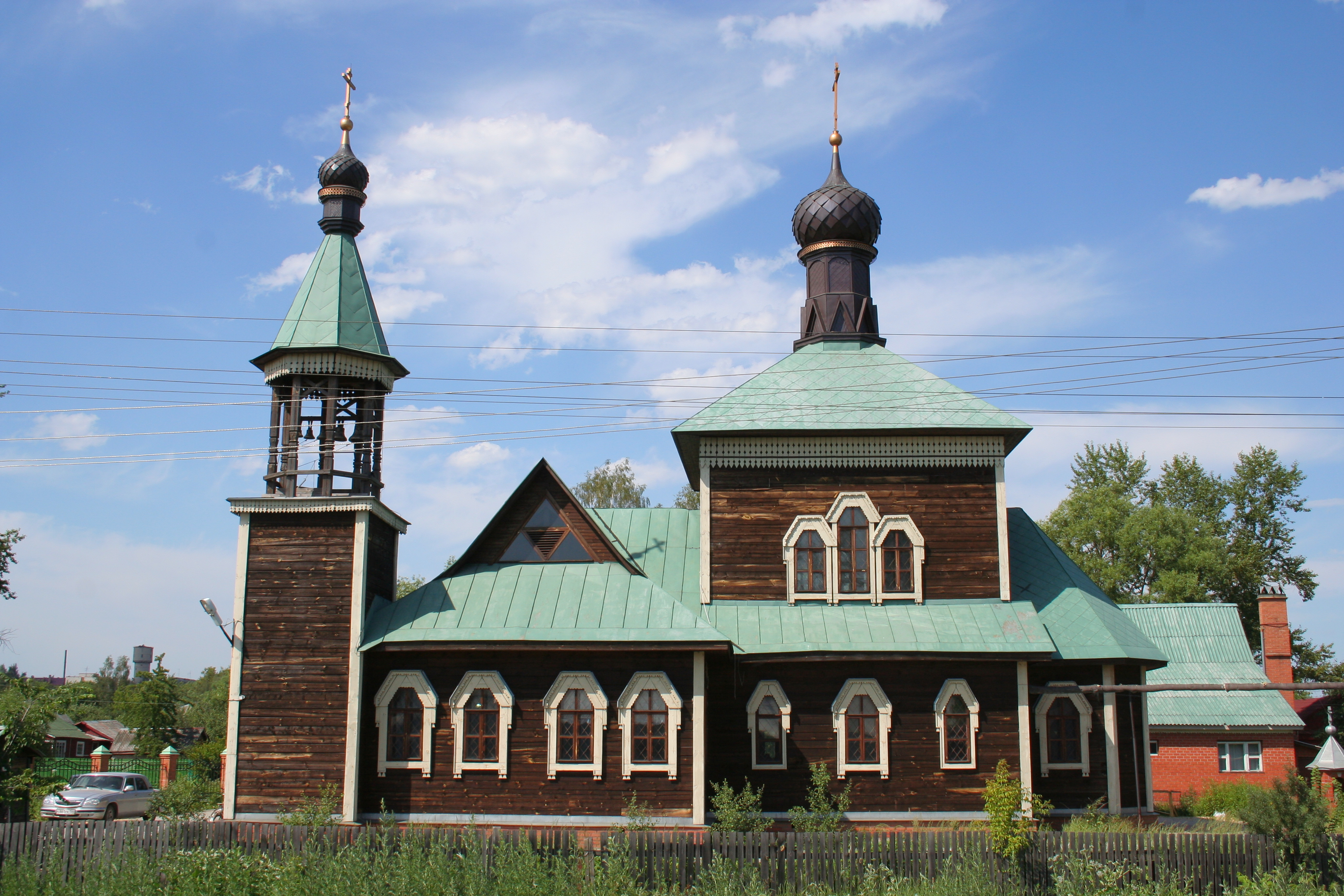 Kirche des Bischofs Athanasius von Kowrow in Petuschki, Oblast Wladimir, Russland.